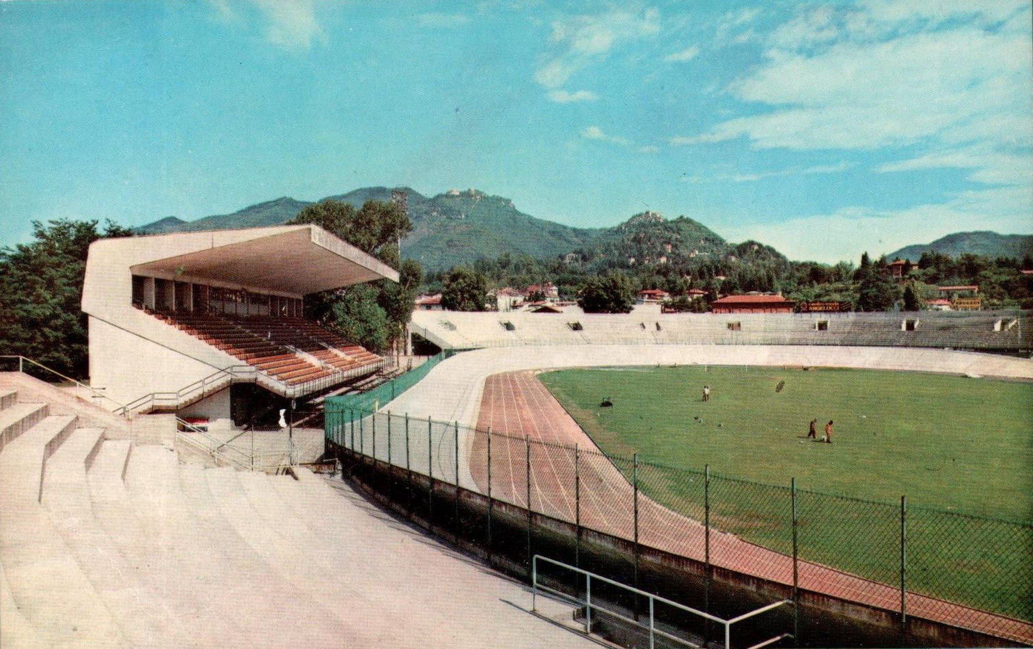 Lo Stadio Franco Ossola di Varese negli anni 1970